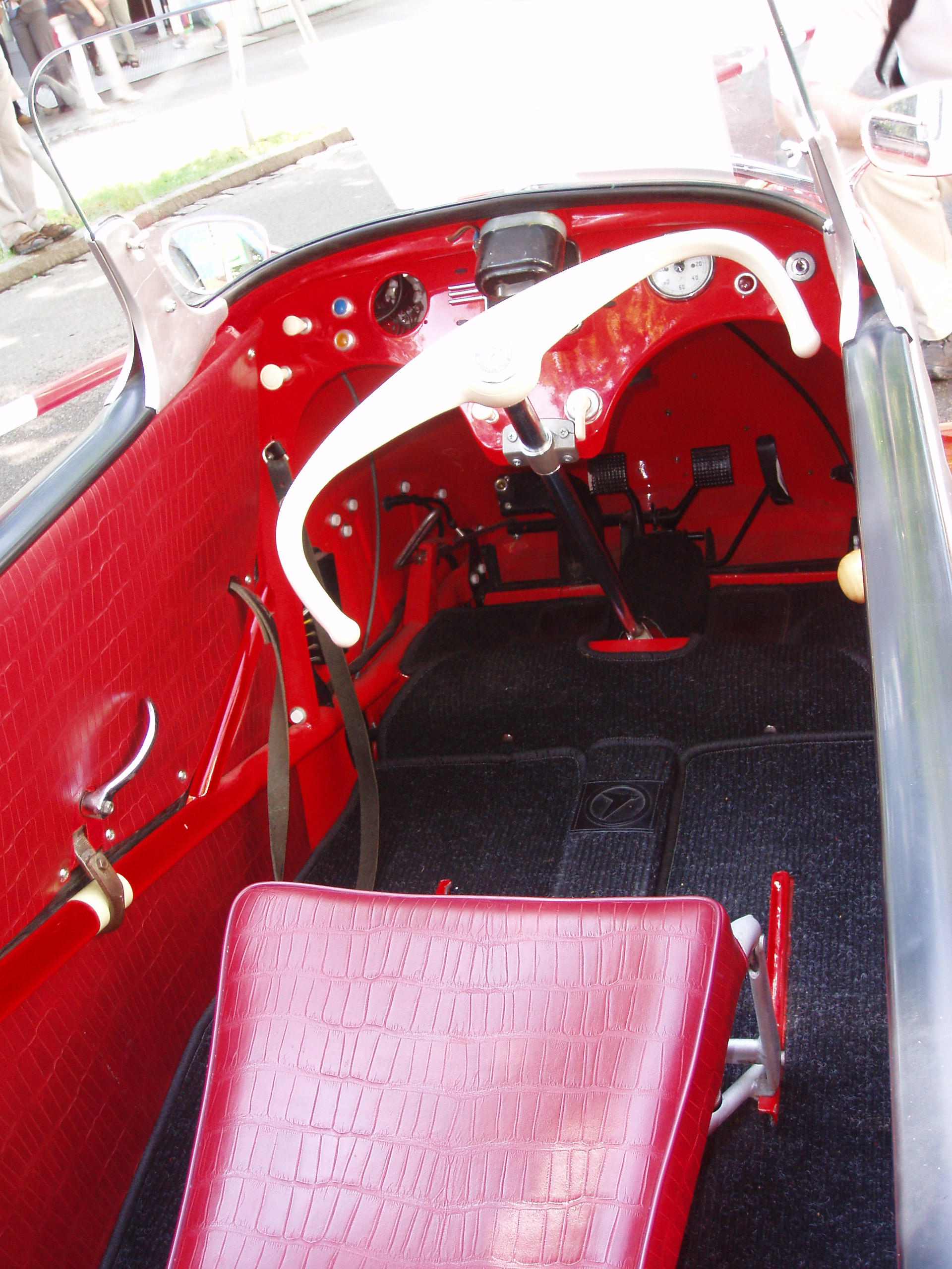 Blick in einen Messerschmitt-Kabinenroller